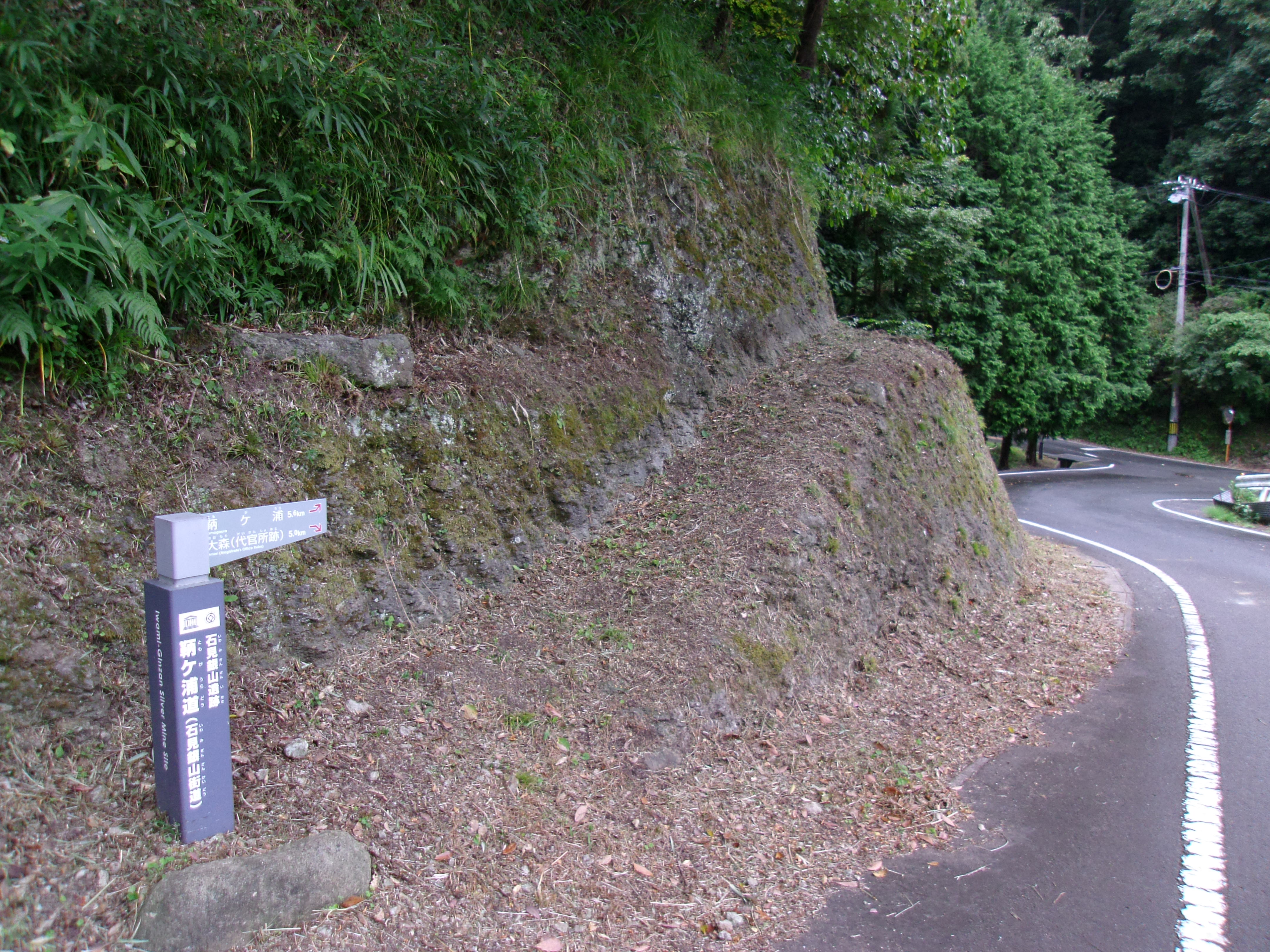 世界遺産「石見銀山」の構成資産である銀山街道鞆ヶ浦道 水ヶ迫集落からの鞆ヶ浦道